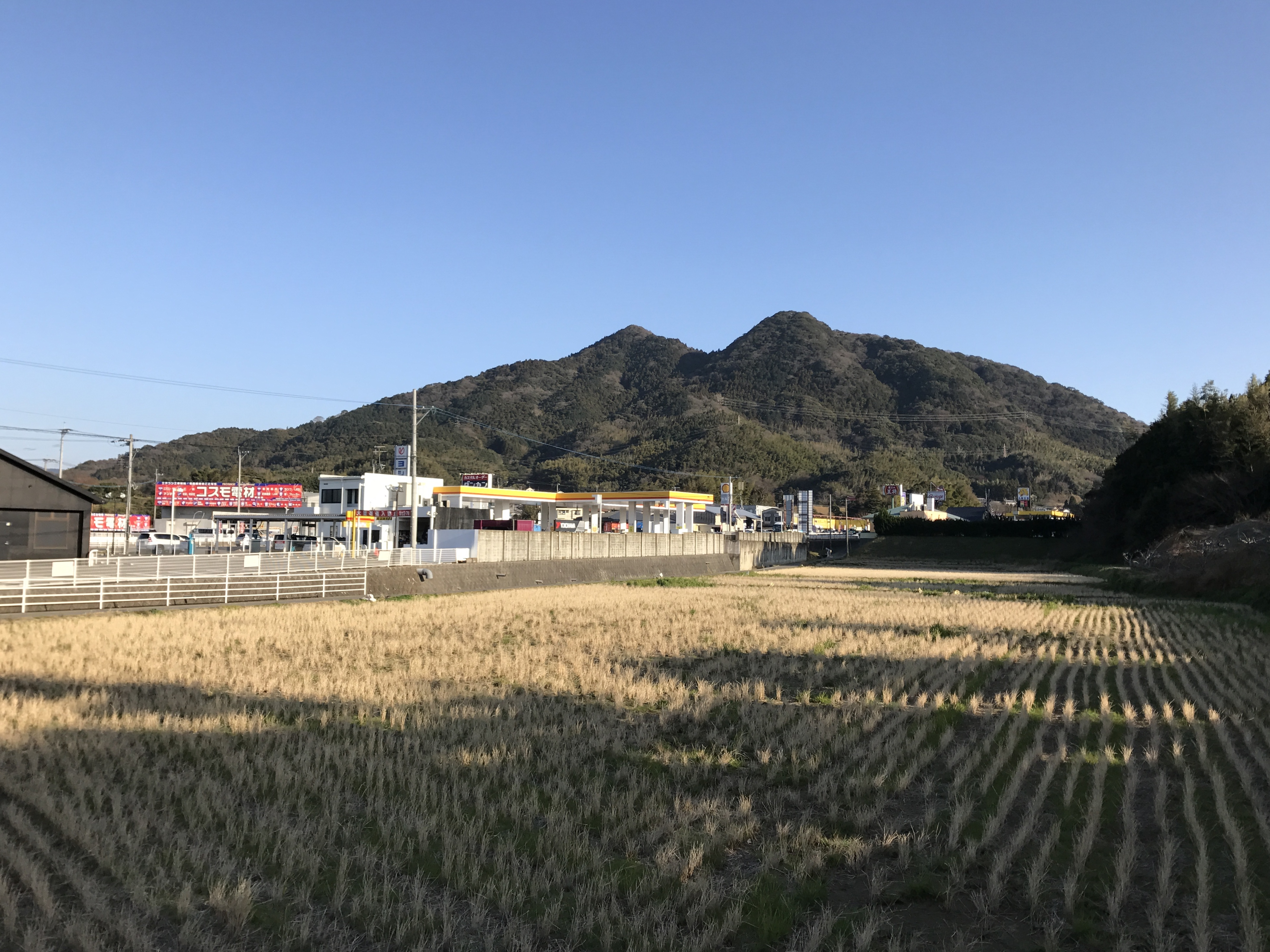 福岡県糟屋郡新宮町原上より望む立花山